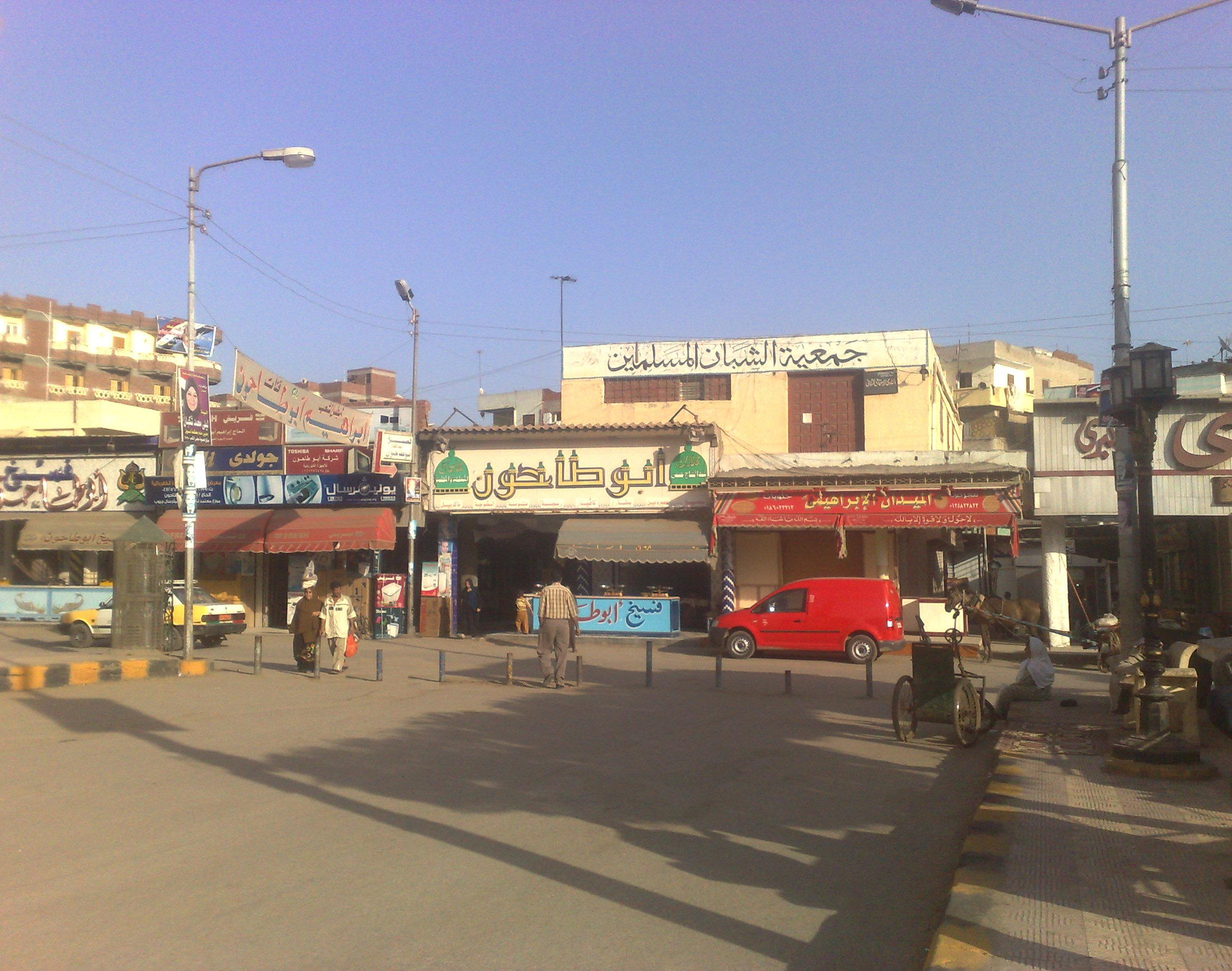 المحال والمعرض التجارية المتخصصة في الحلويات الشرقية والفسيخ بمدينة دسوق